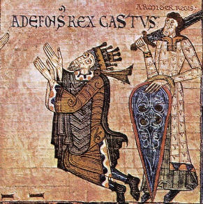 Libro de los Testamentos